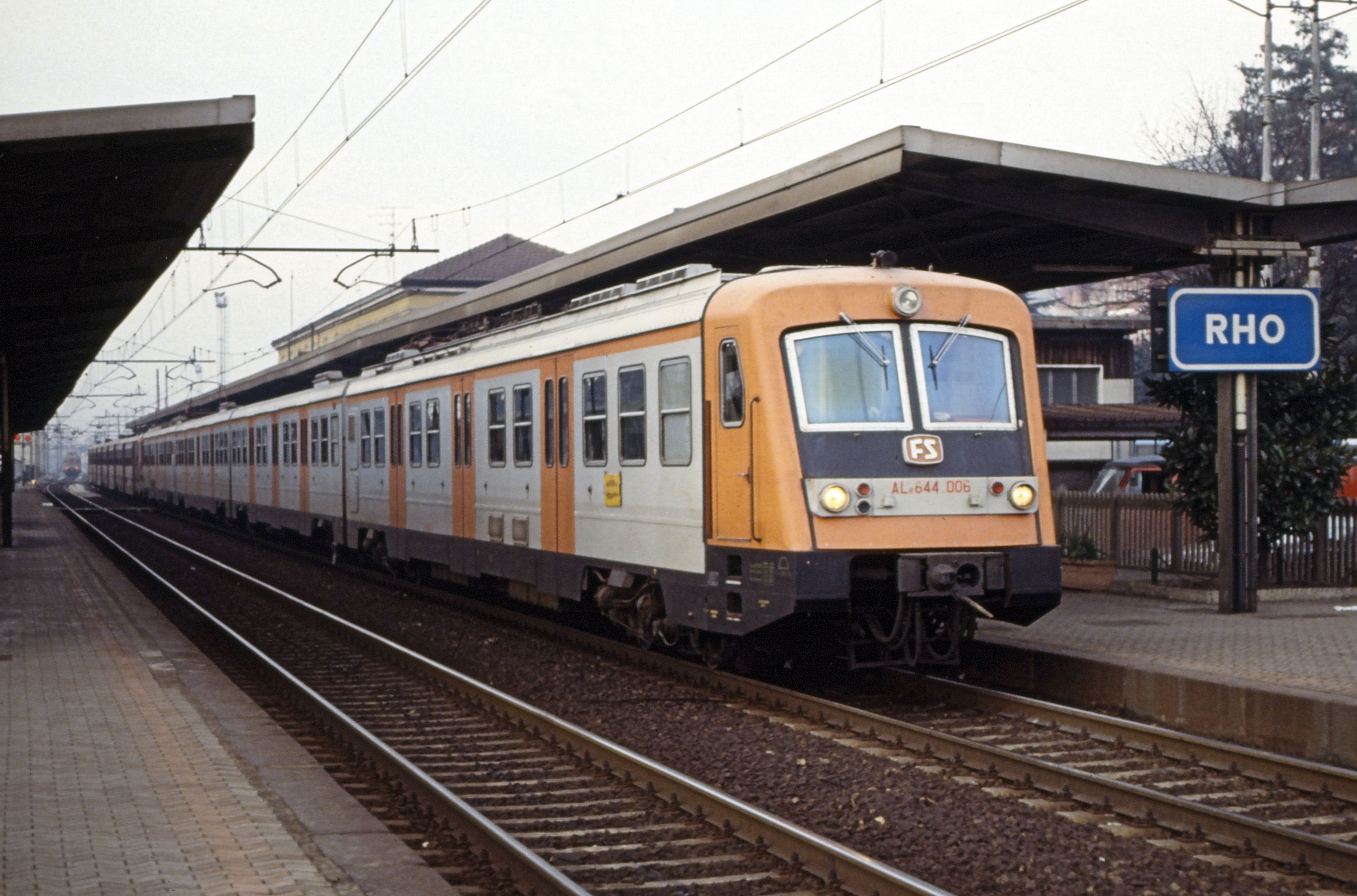 Treno GAI (in testa la ALe 644.006) in sosta a Rho